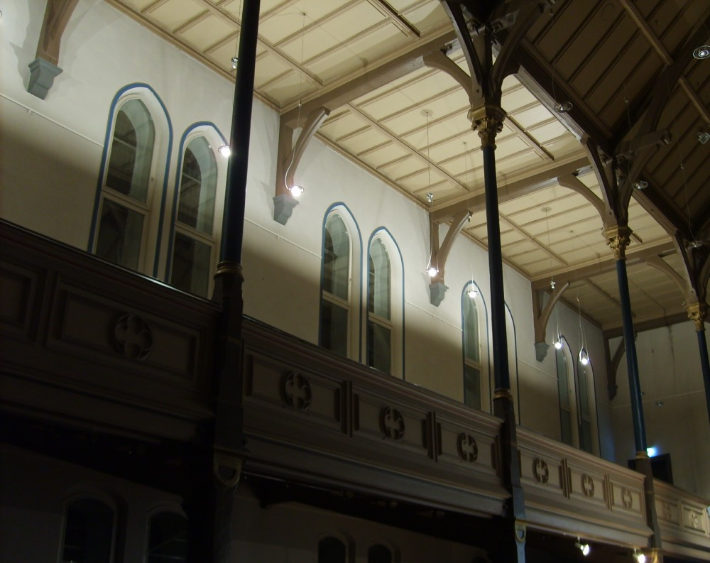 Wuppertal, Immanuelskirche, rechtes Seitenschiff, Empore